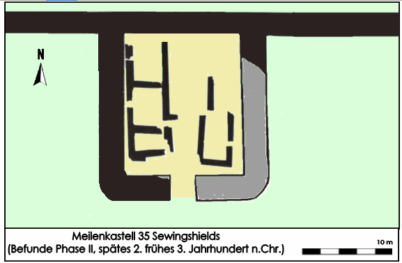 Befundskizze des Meilenkastells 35 Sewingshields, Bauphase II Ende des 2. und frühes 3. Jahrhundert.